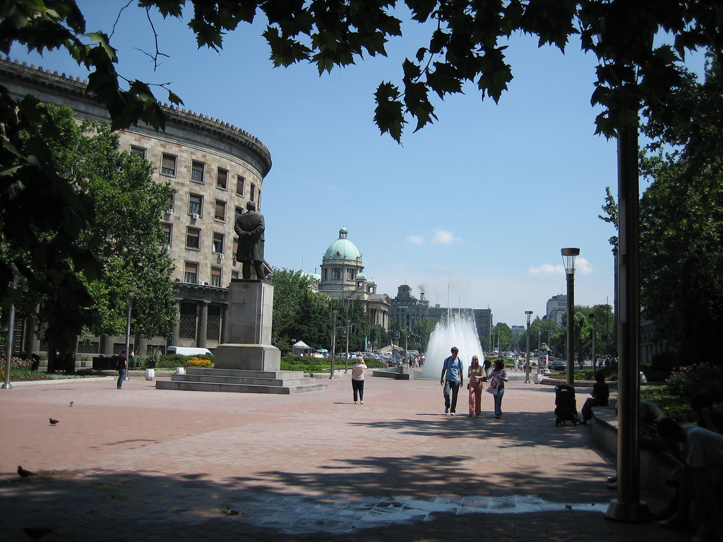 Place de Nikola Pasic, Belgrade, Serbia